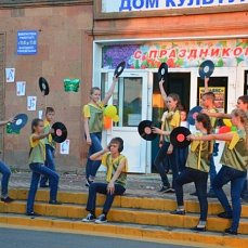 Альянс